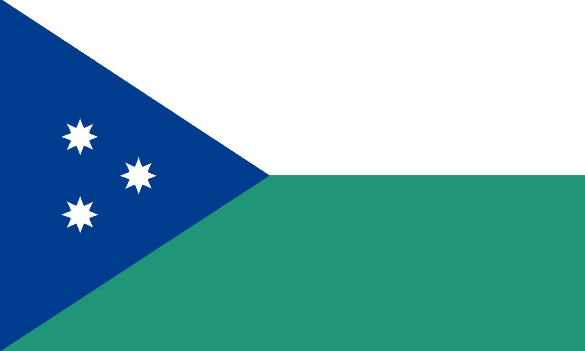 Bandera del cantón de Moravia, Costa Rica.